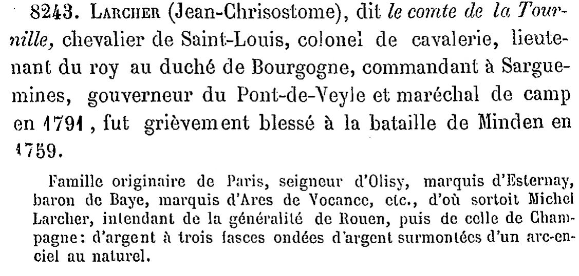 Contexte de la blessure de La Touraille